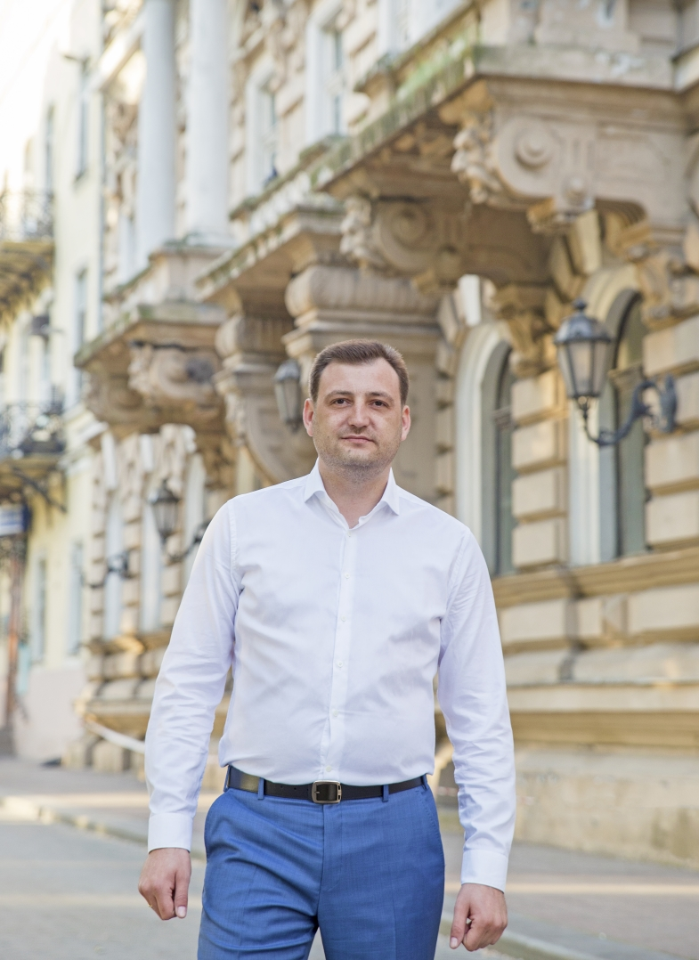 Фото Васильковского Игоря Игоревича